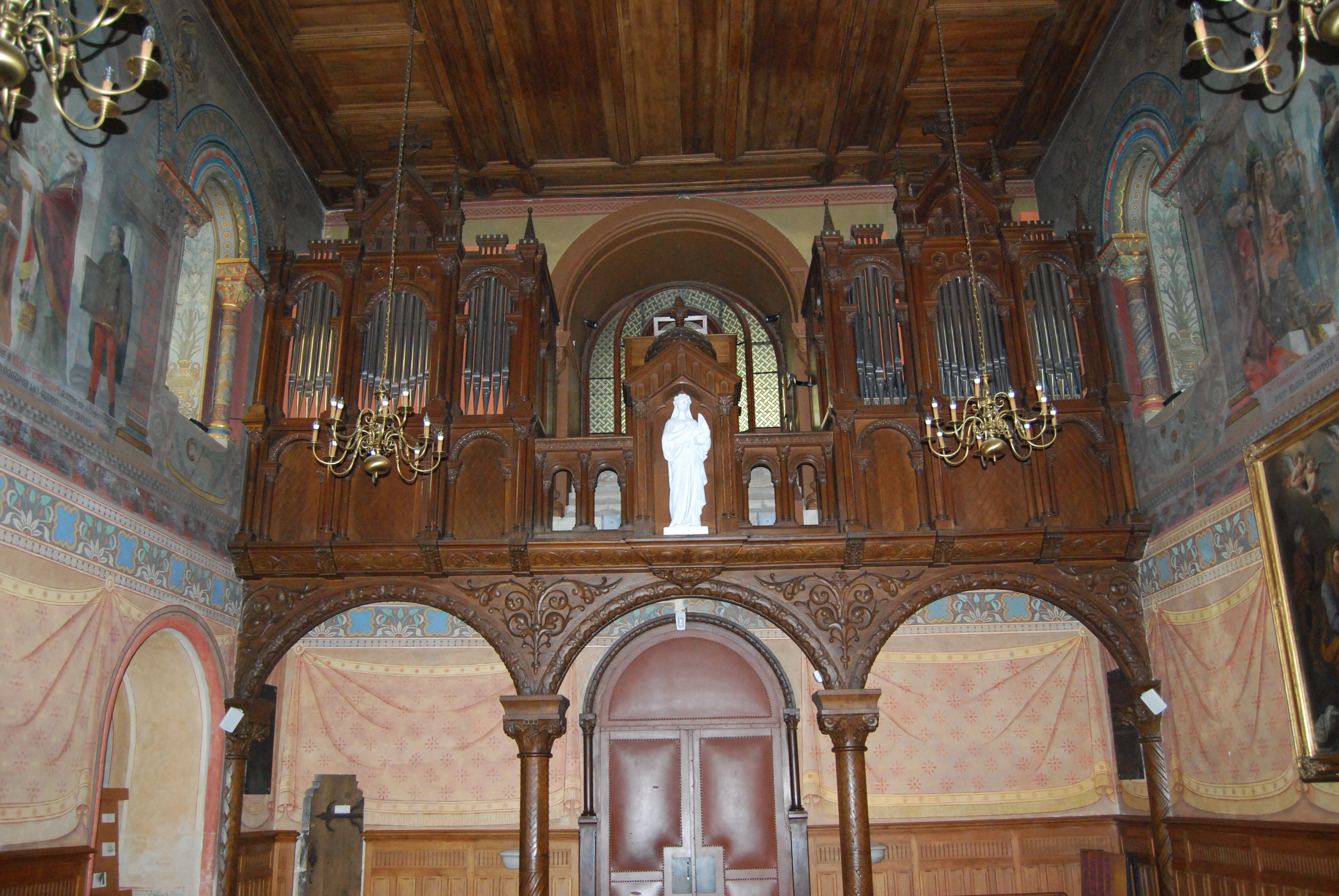 Église Saint-Siméon de Bouliac